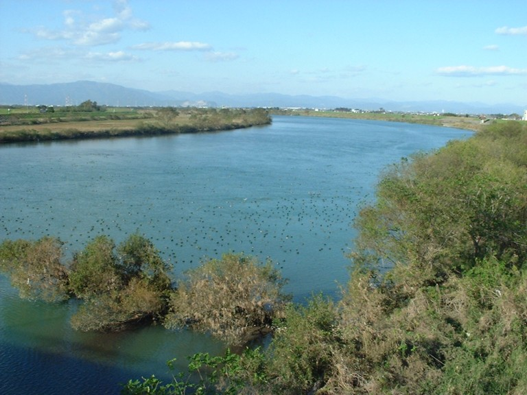 揖斐川 福田大橋東詰から北望 岐阜県海津市（撮影当時は海津郡海津町）